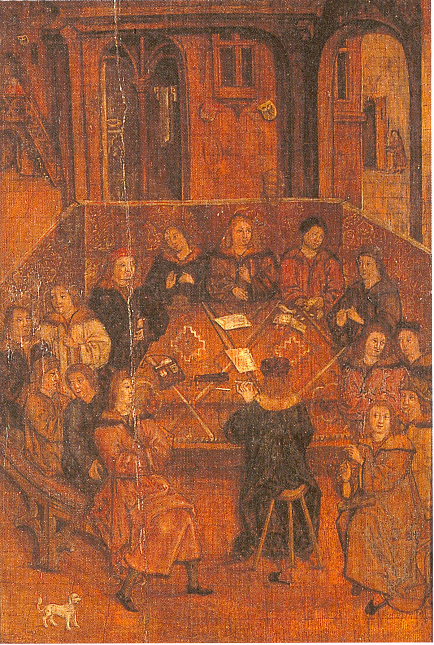 Sitzung des inneren Rates von Wiener Neustadt Vorsitz durch den Bürgermeister, vorne in Rückenansicht der Stadtschreiber, daneben der Stadtrichter